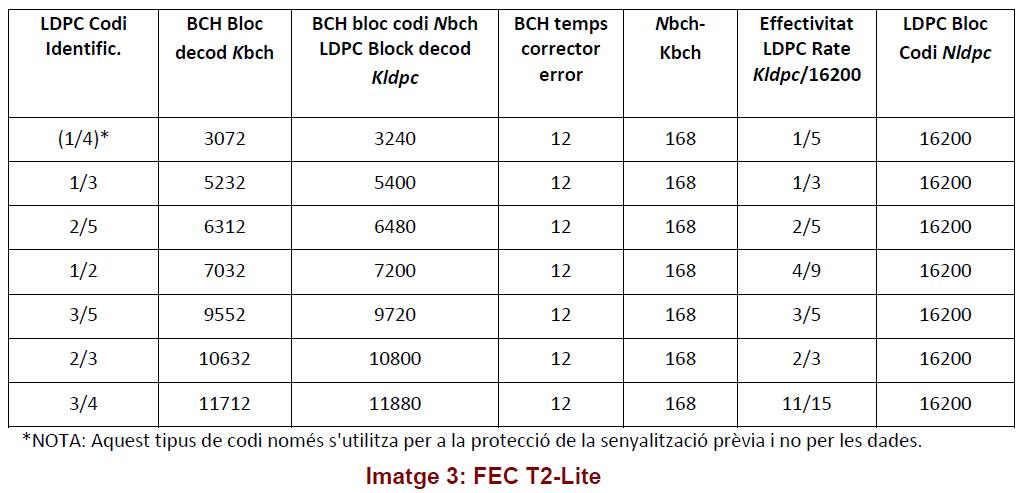 Imatge_3